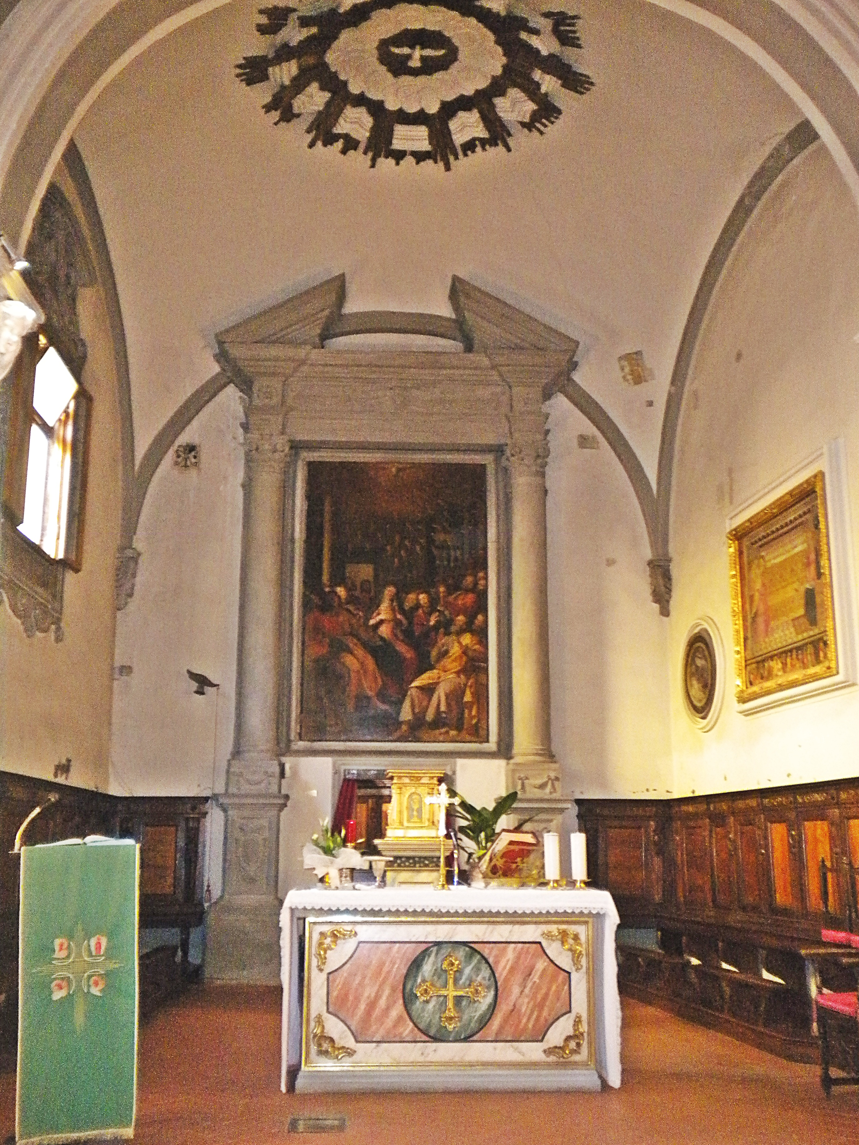 Spirito Santo in Prato, L'artista si ispira a un’incisione di Dürer per l’originale iconografia dello Spirito Santo che scende sulla Madonna e sugli Apostoli come una pioggia di fiammelle e ambienta la scena in un interno domestico caratterizzato dagli oggetti posti sul camino e dalla finestra aperta sul cielo terso. Si può inoltre apprezzare pienamente il sottile gioco di contrappunti fra zone in ombra e il gusto ritrattistico dell’artista nelle belle teste degli Apostoli, in una delle quali, in primo piano, in basso a destra, alcuni dicono di raffigurarci un autoritratto. E’ di notevole immediatezza anche l’atmosfera raccolta, che trasmette il senso della solennità e la ricchezza del messaggio di fede propria dell’evento sacro.